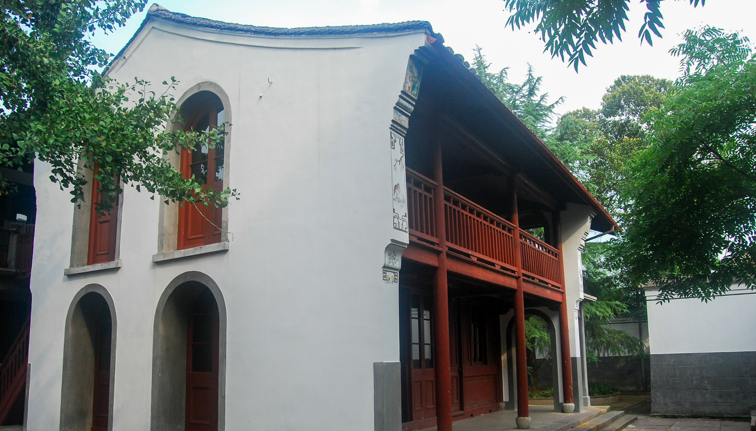 中文（中国大陆）: 蒋氏故居丰镐房